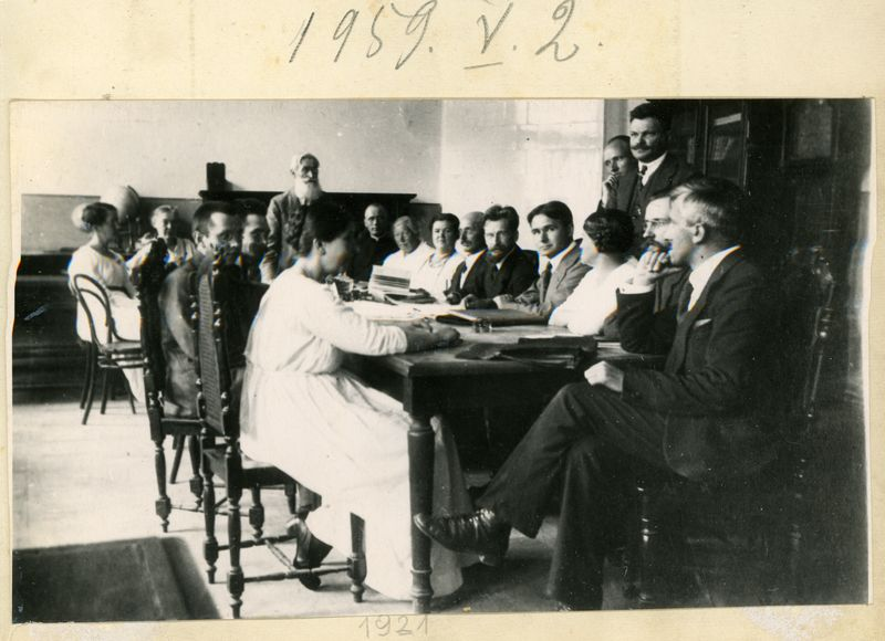 Pedagogų posėdis mokytojų seminarijoje (kalba Juozas Kairiūkštis, jam iš dešinės sėdi kunigas K. Čibiras, nežinomos moterys, M. Šikšnys, Viktoras Biržiška, Bronius Untulis, nežinomi moteris ir vyras, Vytautas Kairiūkštis. Vilnius, 1921 metai